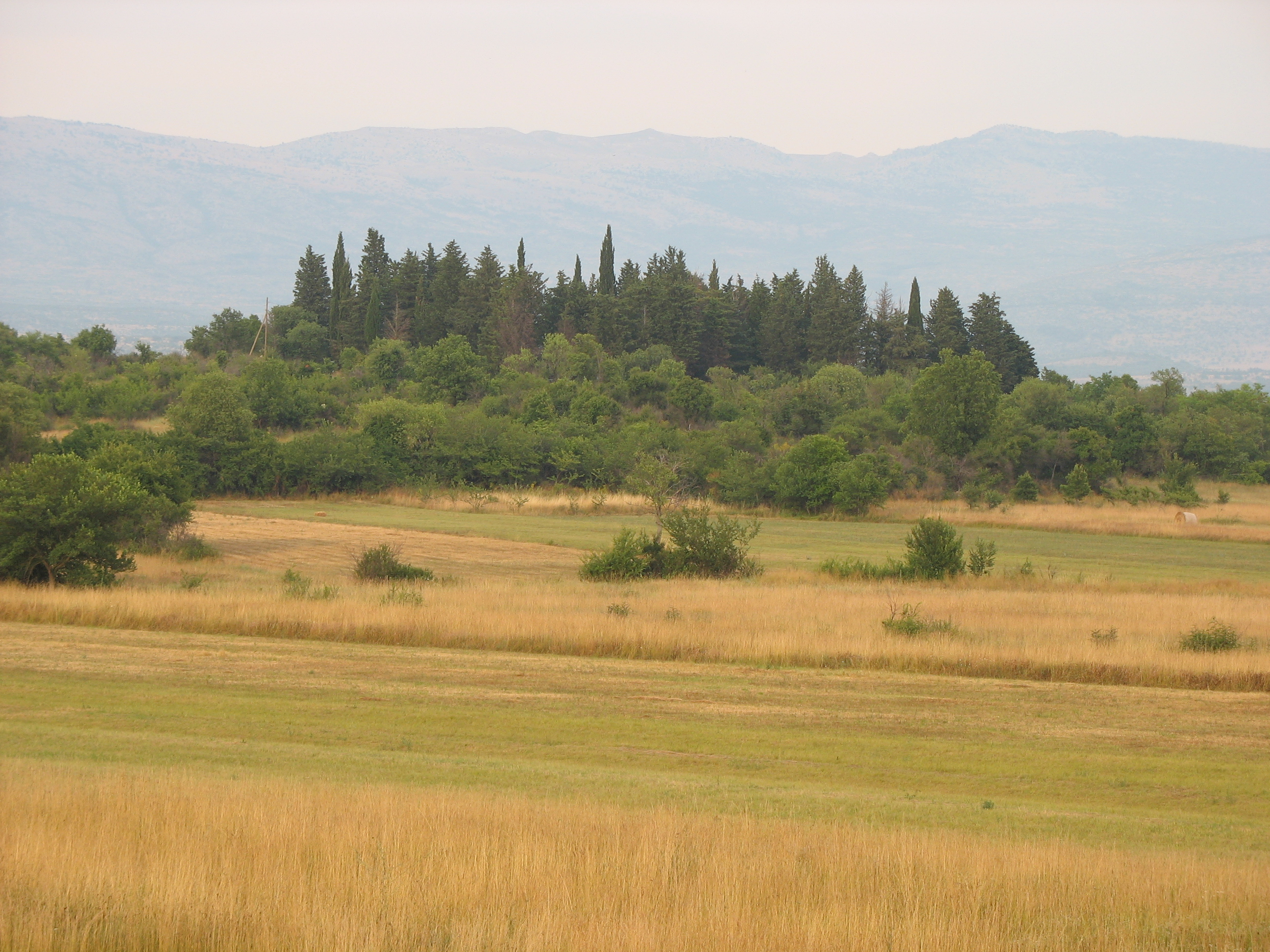 Kričke u blizini Drniša.